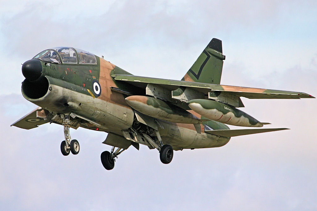 Corsair - RIAT 2007